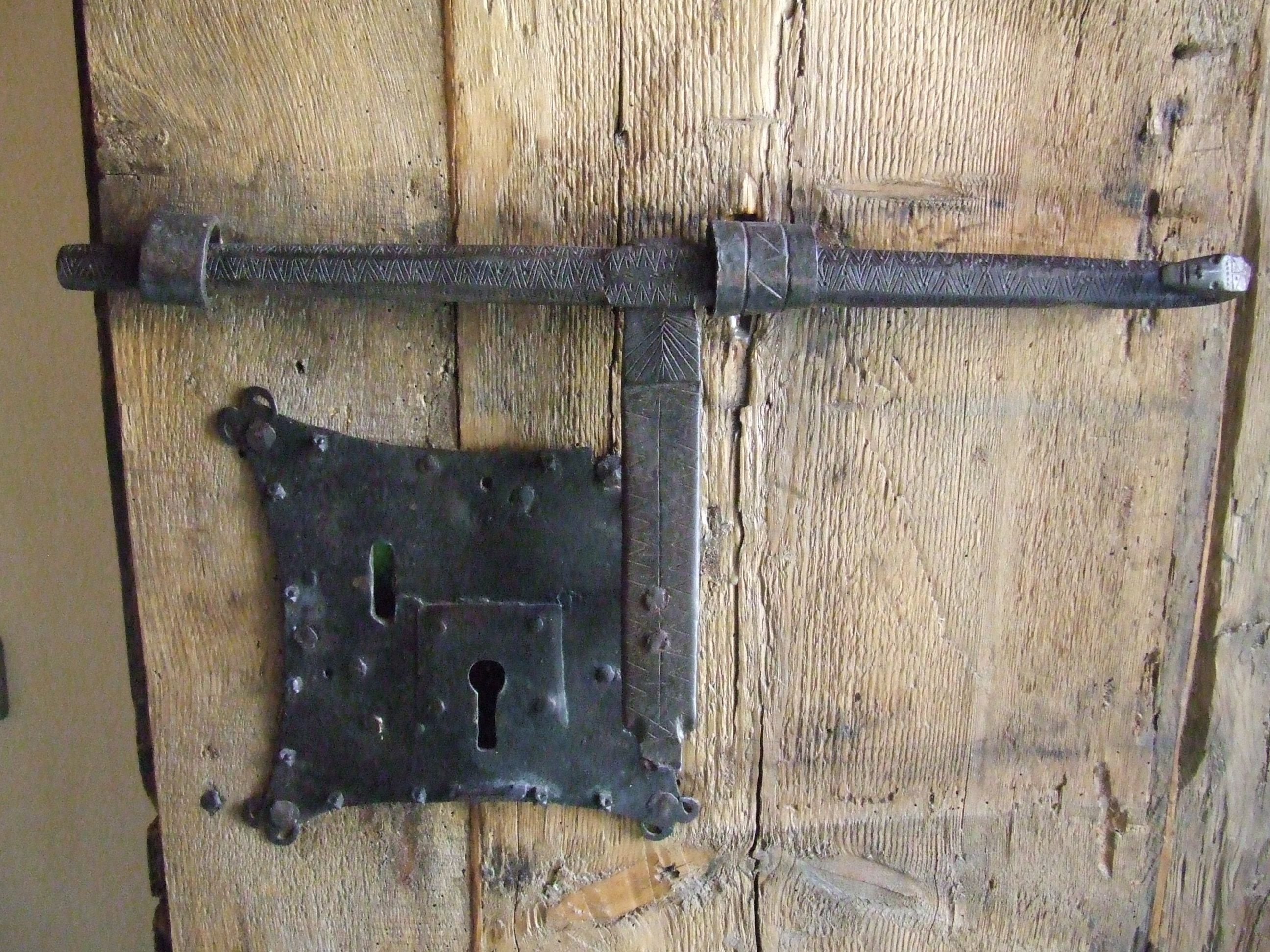 Ferramenta original de Santa Maria de Cardet (Barruera, Vall de Boí, Alta Ribagorça)